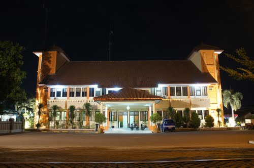 Mairie de Tangerang du Sud